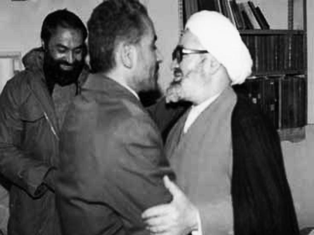 Montazeri& rajaee